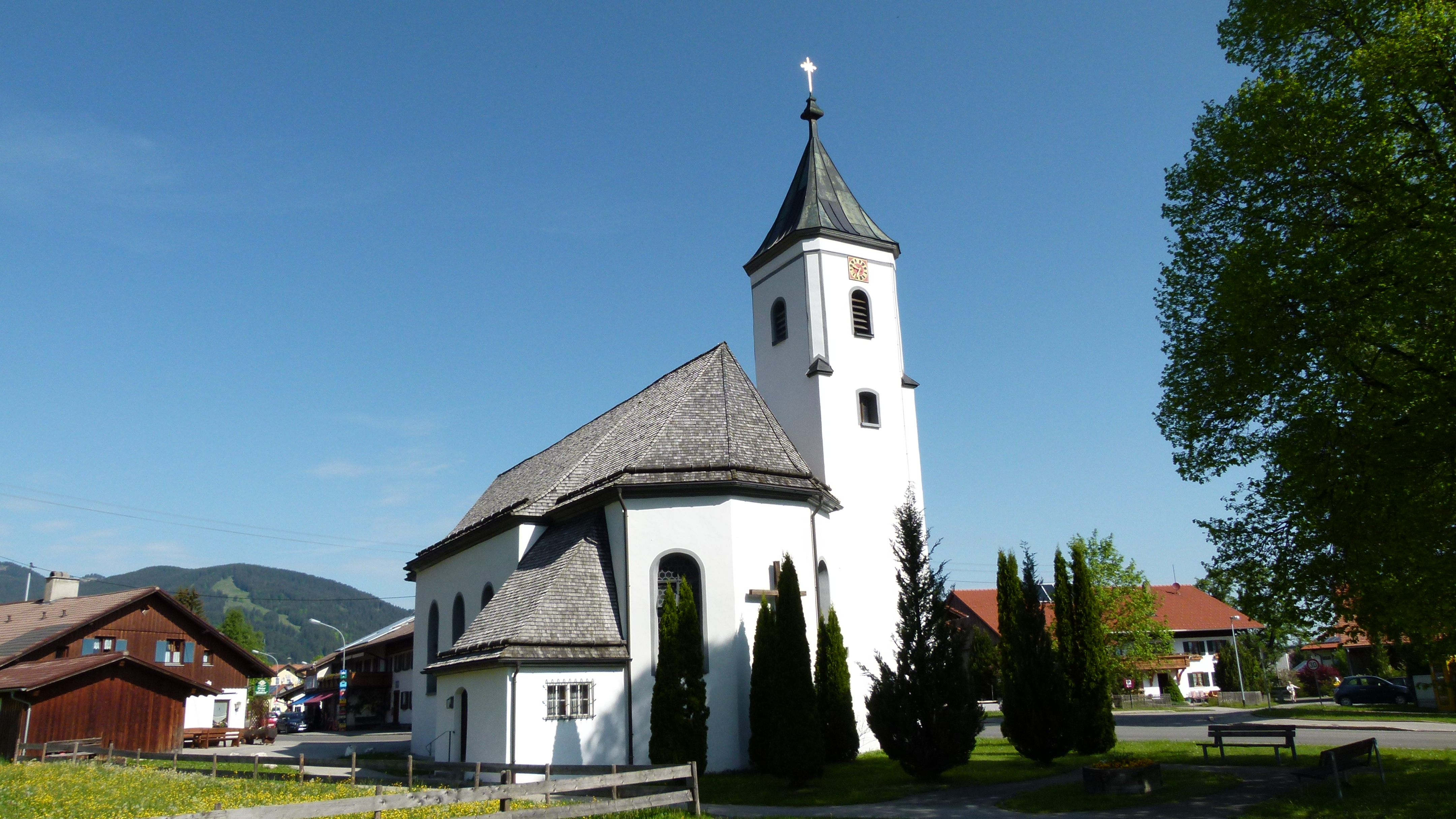 Filialkirche St. Michael in Pfronten-Steinach